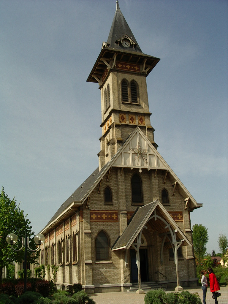 Eglise Saint Auguste Vendin le Vieil